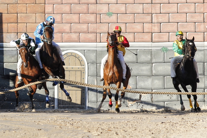 La partenza della corsa ippica del Palio di Legnano 2013